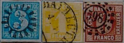 Description:Trois des timbres des premières séries de BavièreSource: Photographié parUtilisateur:Koppi2, du wikipedia en allemand Licence: Bavière